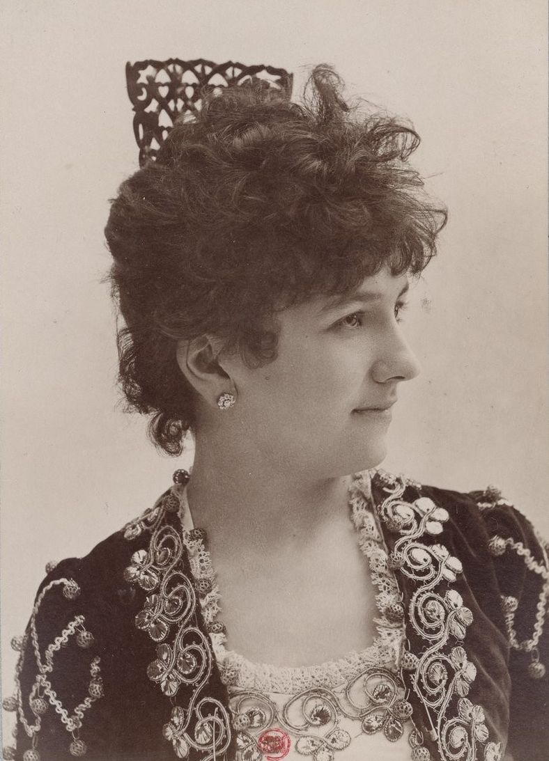 Sigrid Arnoldson, Opéra-Comique, Le barbier de Séville, photographie Atelier Nadar